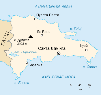 Карта Дамініканскай Рэспублікі